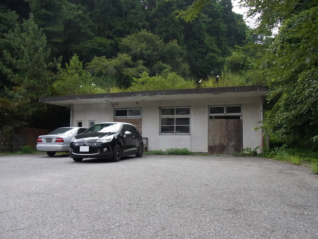 旧のと鉄道能登線飯田駅